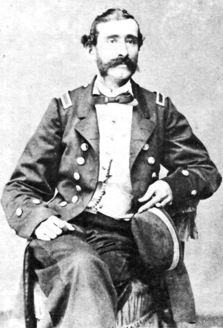 Lizardo Montero Flores (1832-1905) marino y político peruano. Presidente del Perú de 1881 a 1883.